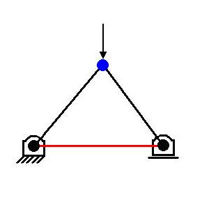 Ejemplo de comportamiento de nudo en estructura con configuración en triángulo